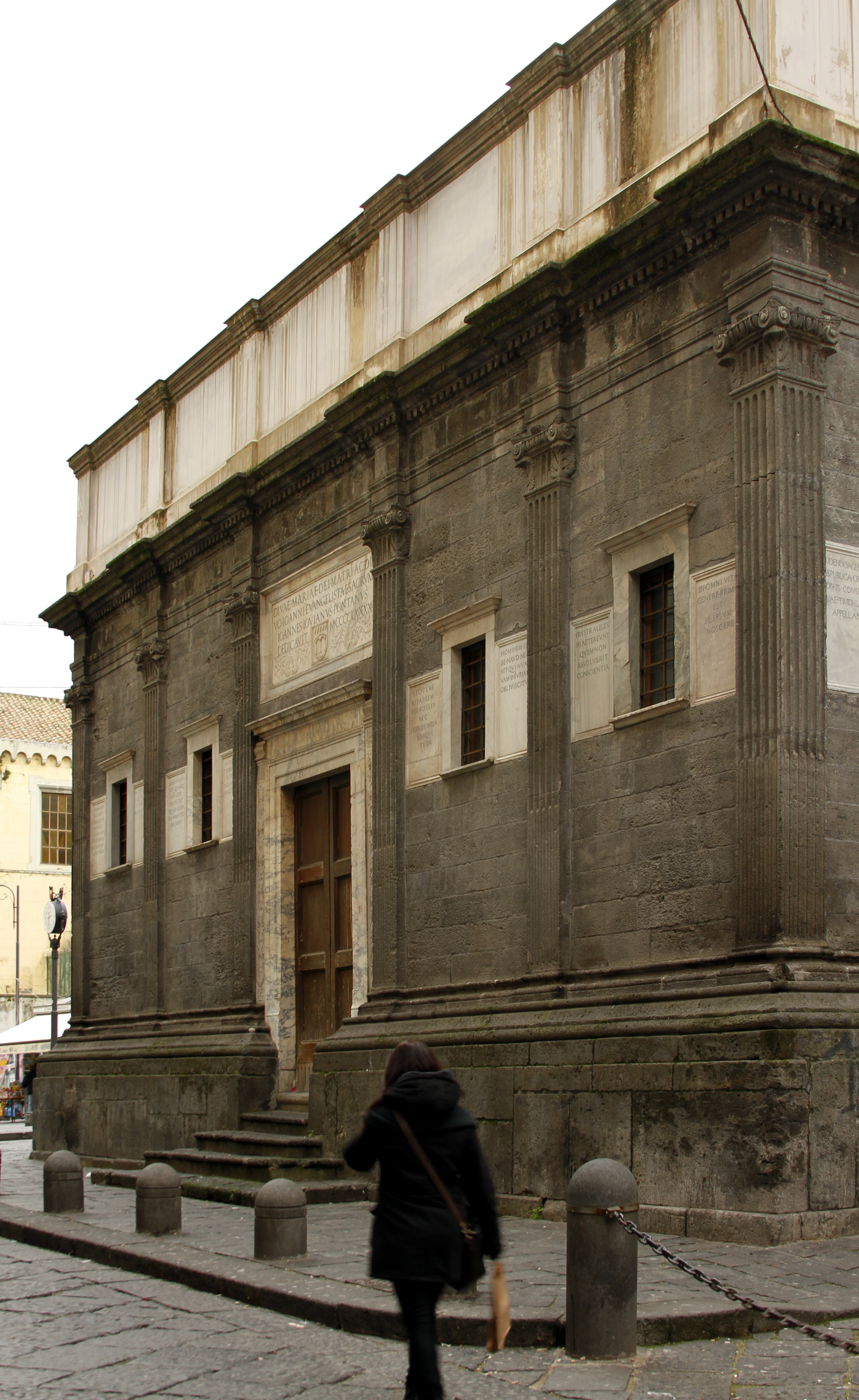 Santa Maria Maggiore e Capela Pontano - Nápoles